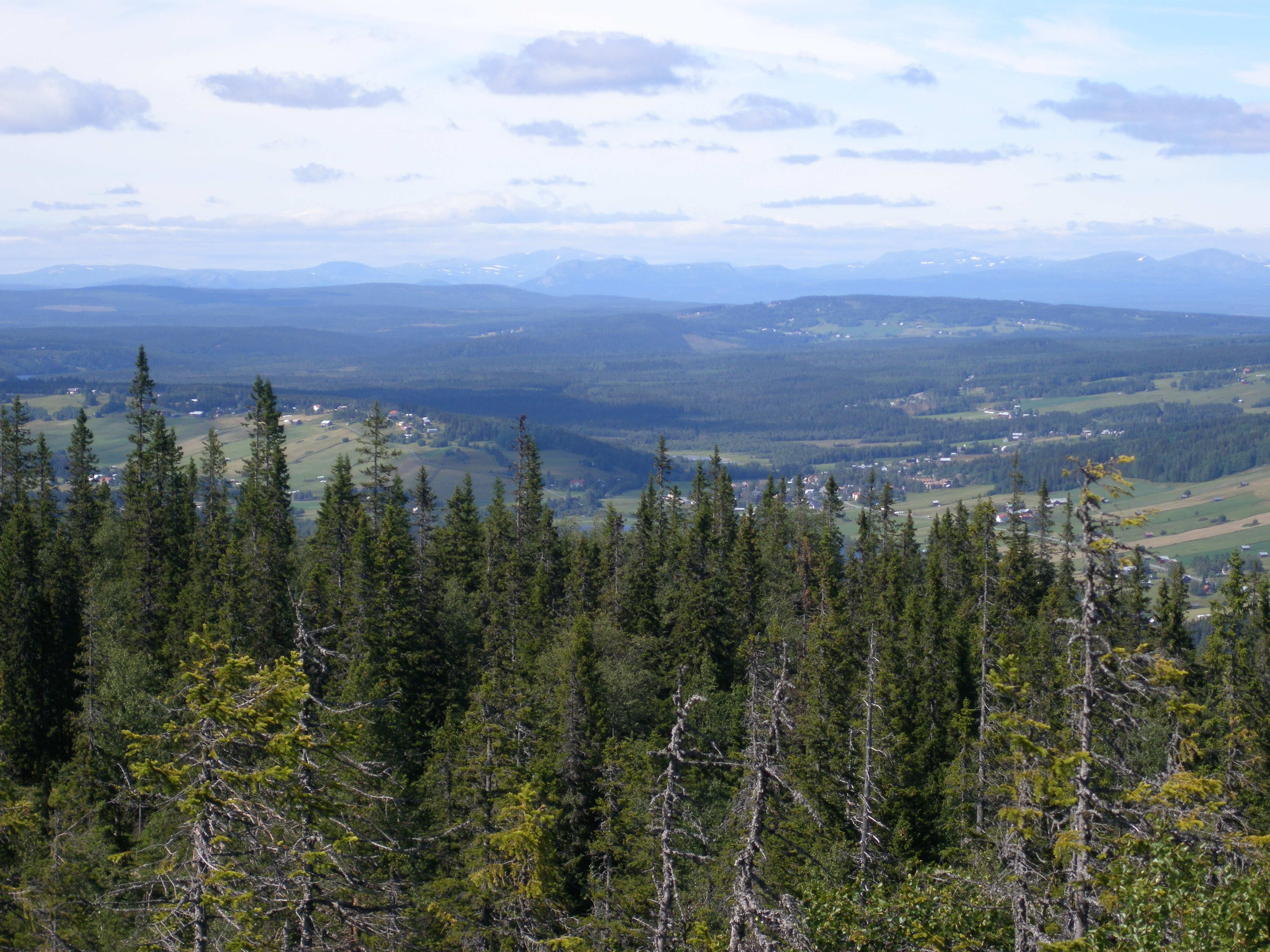 Offerdalsfjällen, Offerdal, Krokoms kommun, Jämtlands län, Sverige.